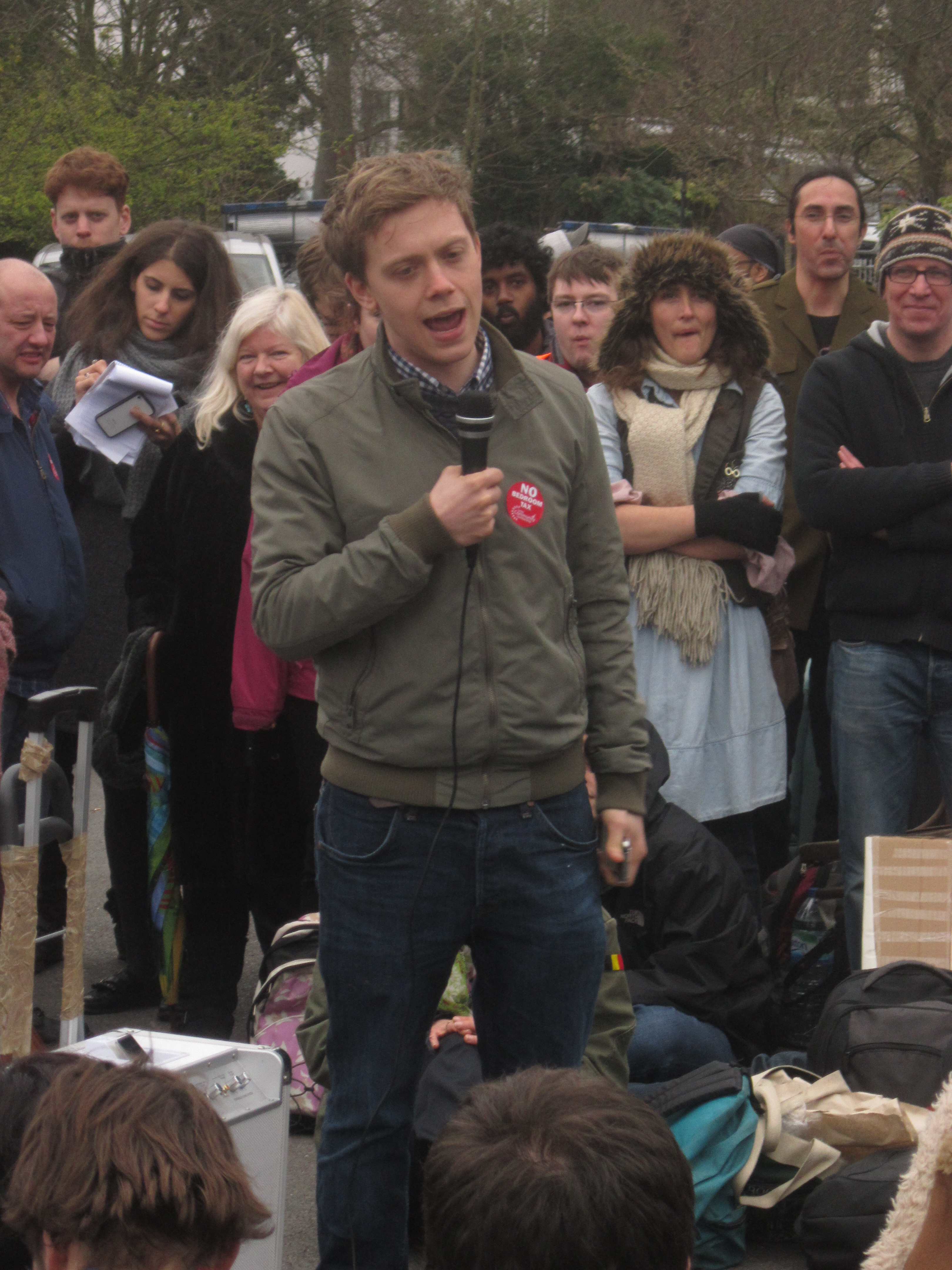 Owen Jones